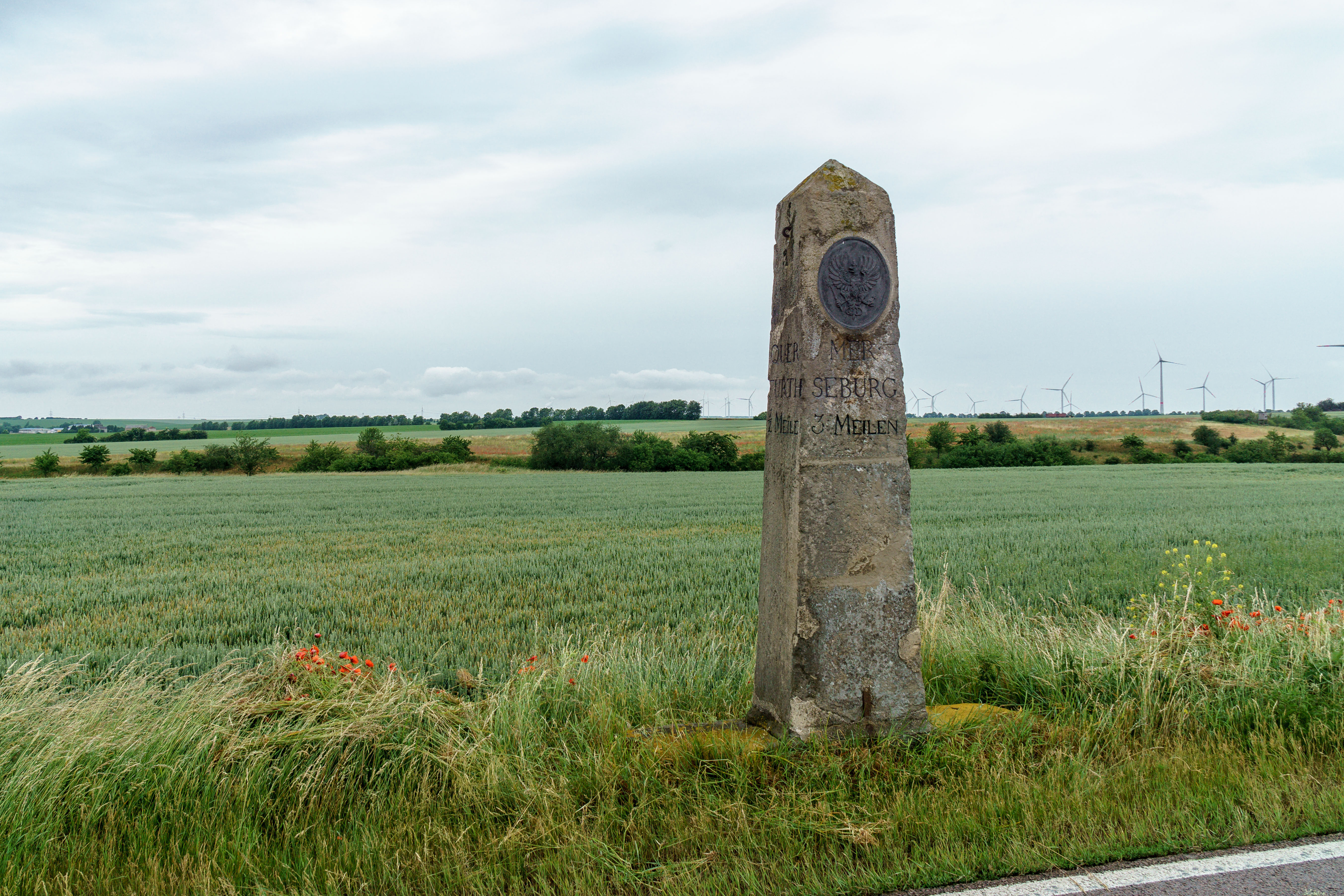 Preußischer Ganzmeilenobelisk an der L172 bei Obhausen (Altweidenbach) Inschrift: MERSEBURG 3 MEILEN, QUERFURTH ½ MEILE ; SCHAFSTÄDT 1 MEILE